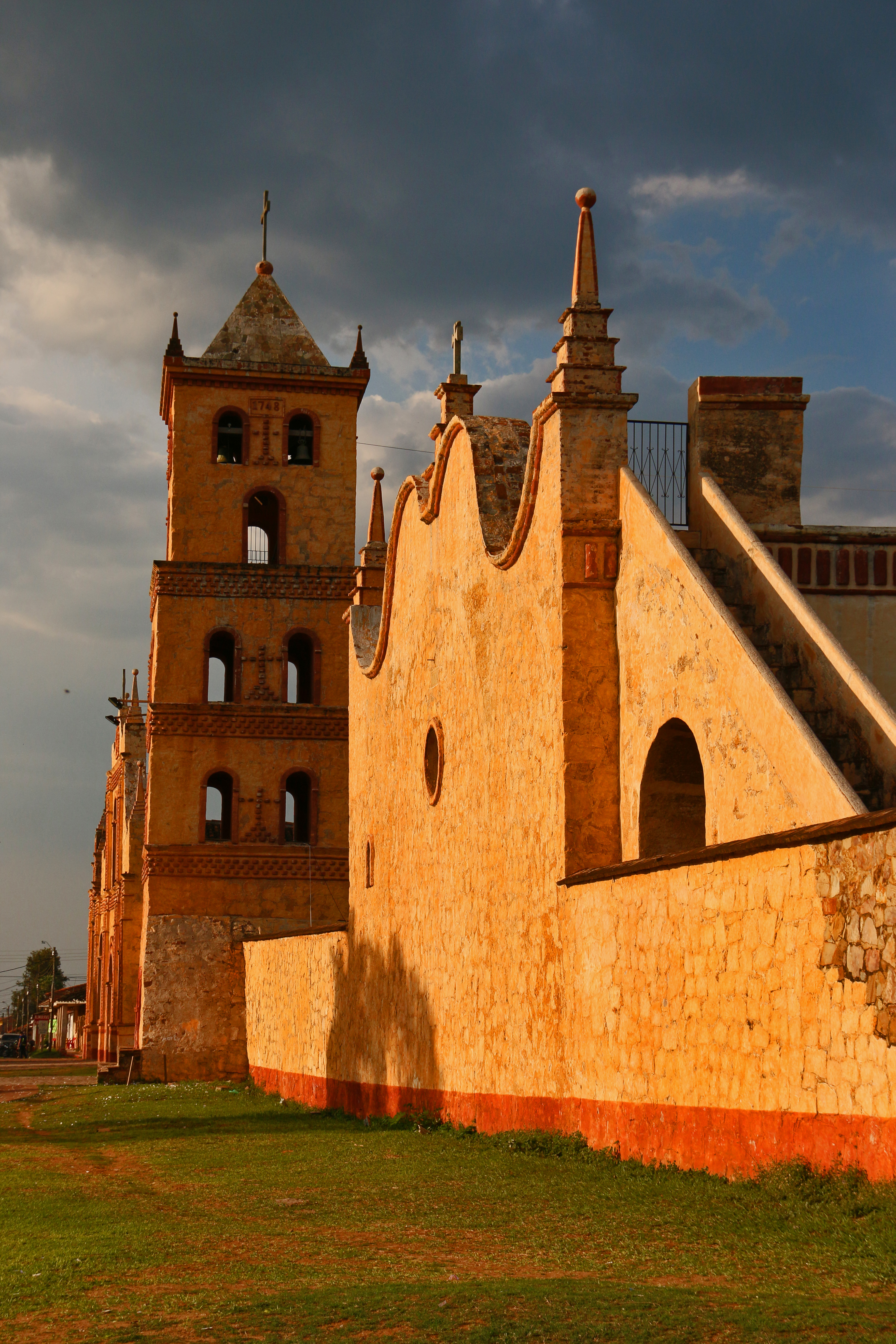 Santa Cruz la Vieja This medium shows the protected monument with the number S/00-038 in Bolivia.